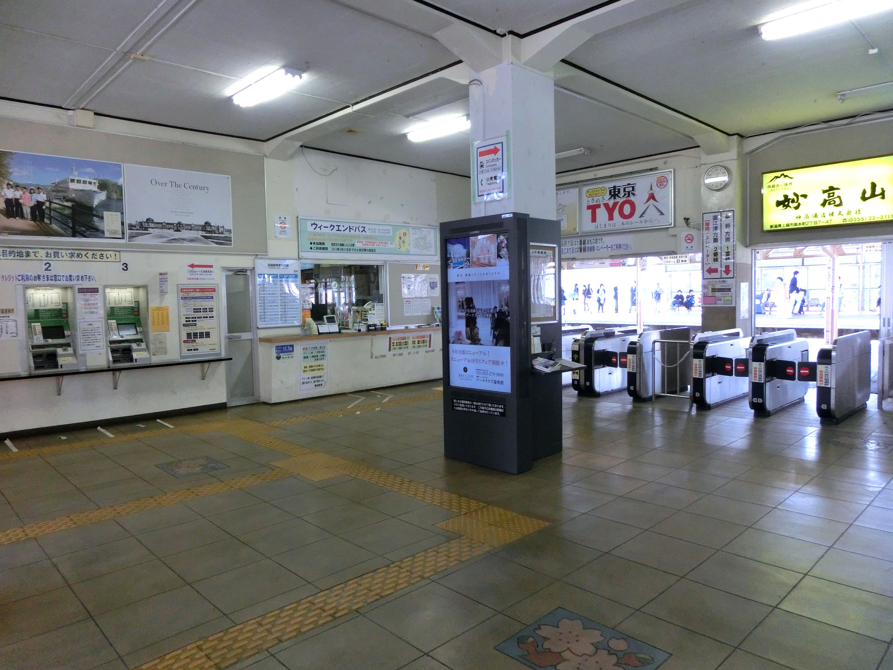 高田駅舎内